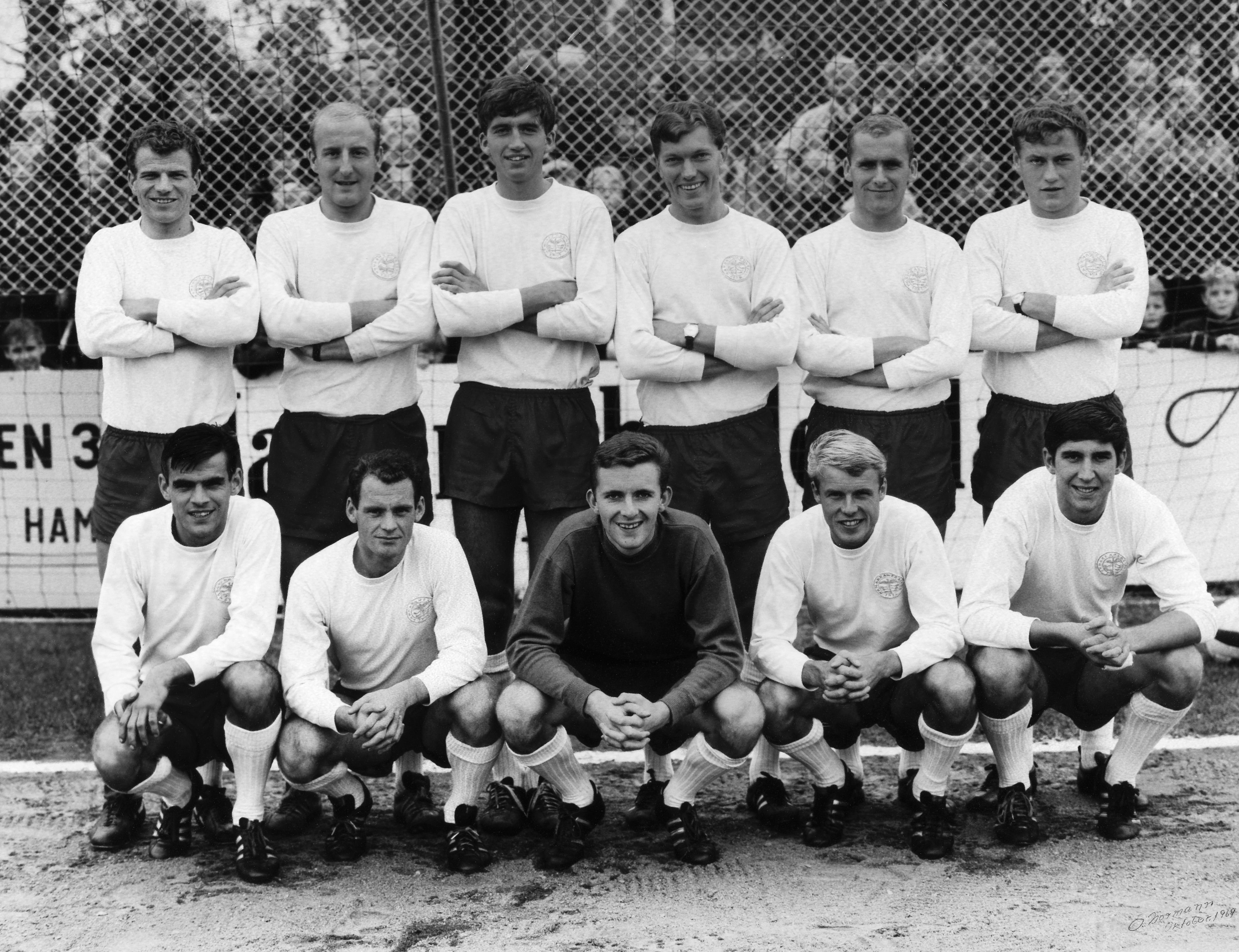 Lagbilde før en semifinale mot Strømsgodset i 1969. Lagene spilte to semifinaler, da den første kampen endte 0-0. Foran f. v. Erik Skattum, Bjørn Hansen, Hans Glorvigen, Kjell Håkonsen, Kai Nyland. Bak. f. v. Edgar Malman, Finn Thorsen, Trond Ellefsen, Leif Hagelund, Knut Amundsen, Helge Grønlien.